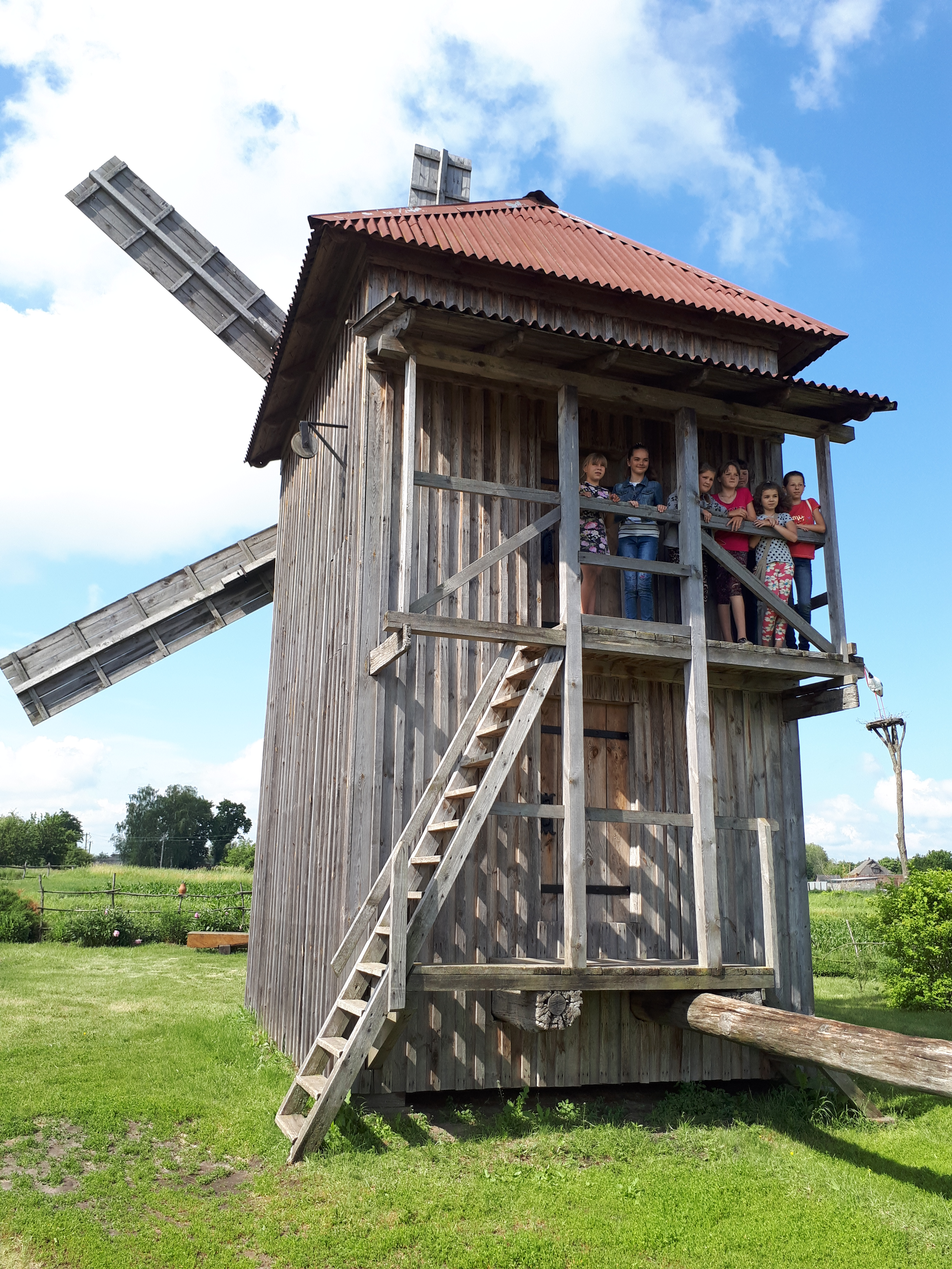 Вітряк неподалік від Троїцької церкви